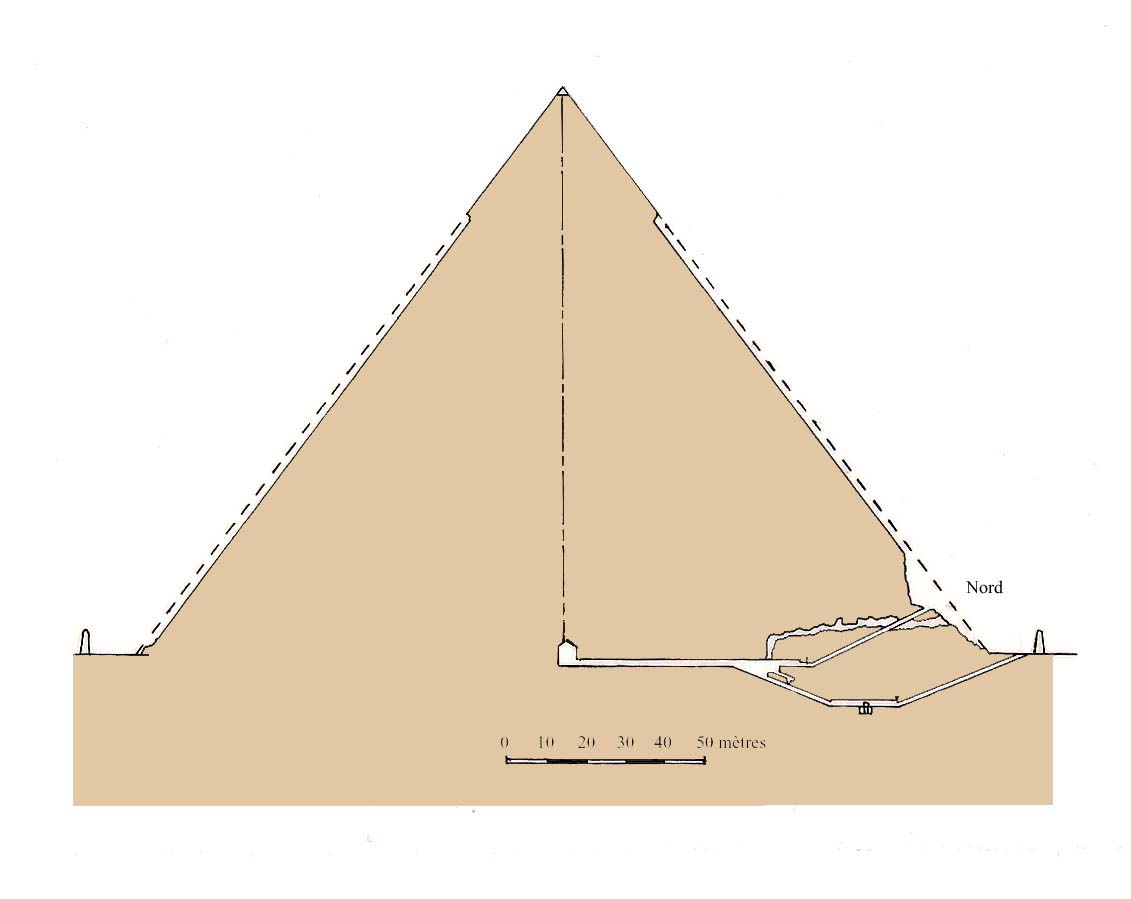 Coupe de la pyramide de Khéphren à Gizeh